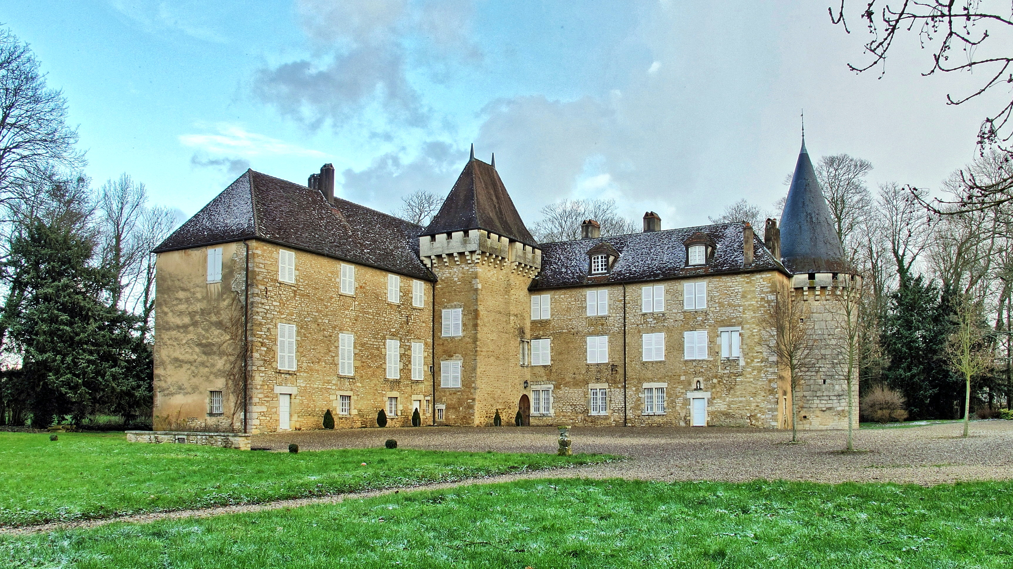 Inscrit aux monuments historiques sous le numéro : PA00101798